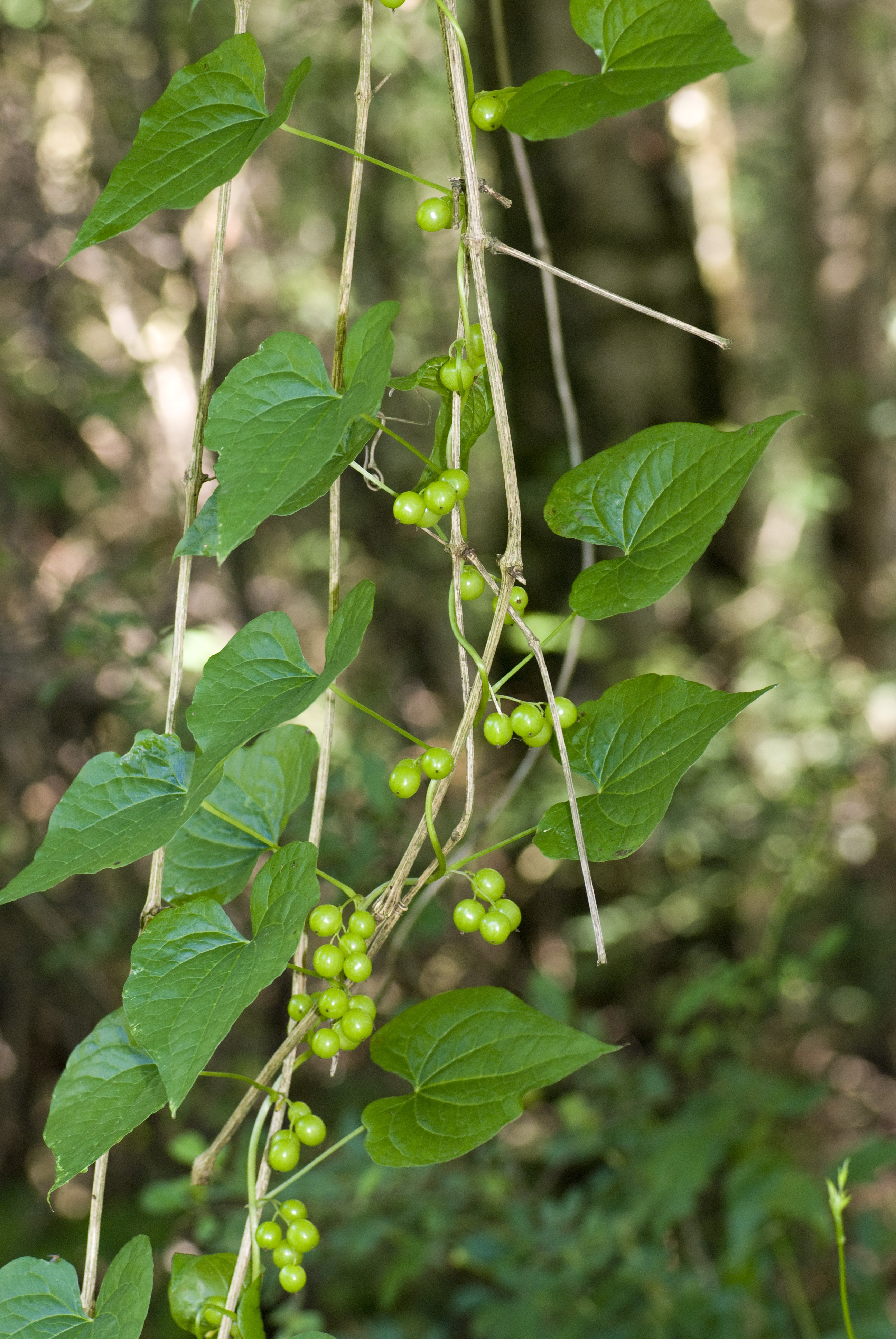 Tamus communis Coteau de Chartèves (Aisne), France